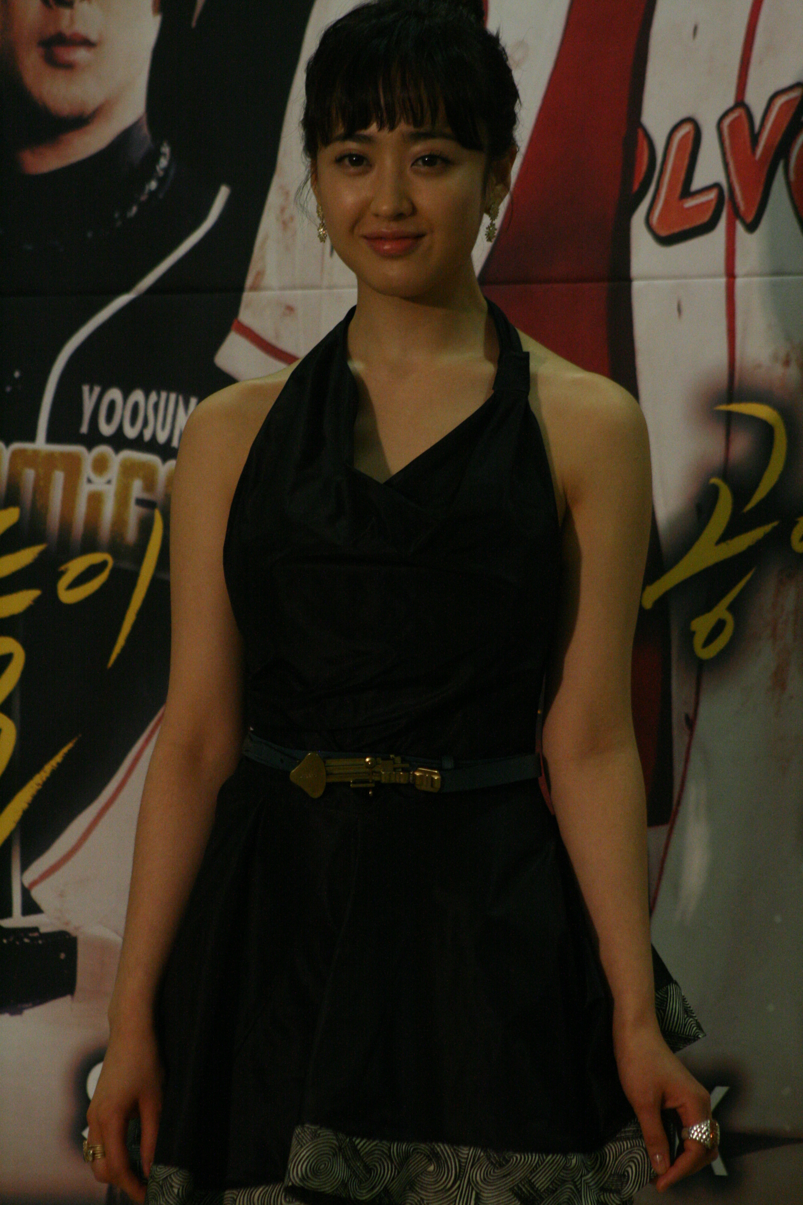 2009년 4월 27일 열린 MBC 드라마 《2009 외인구단》 제작발표회에서의 김민정.